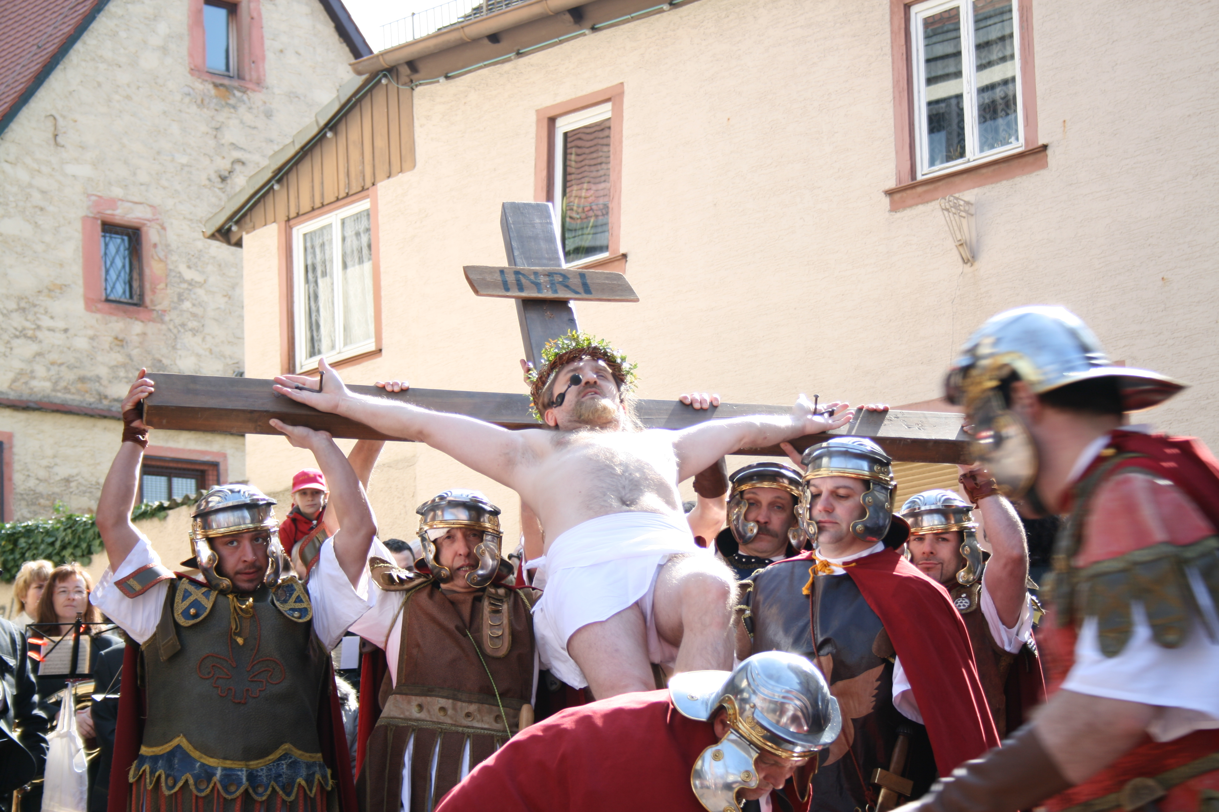 Kreuzigung Bensheimer Passionsspiel 2010